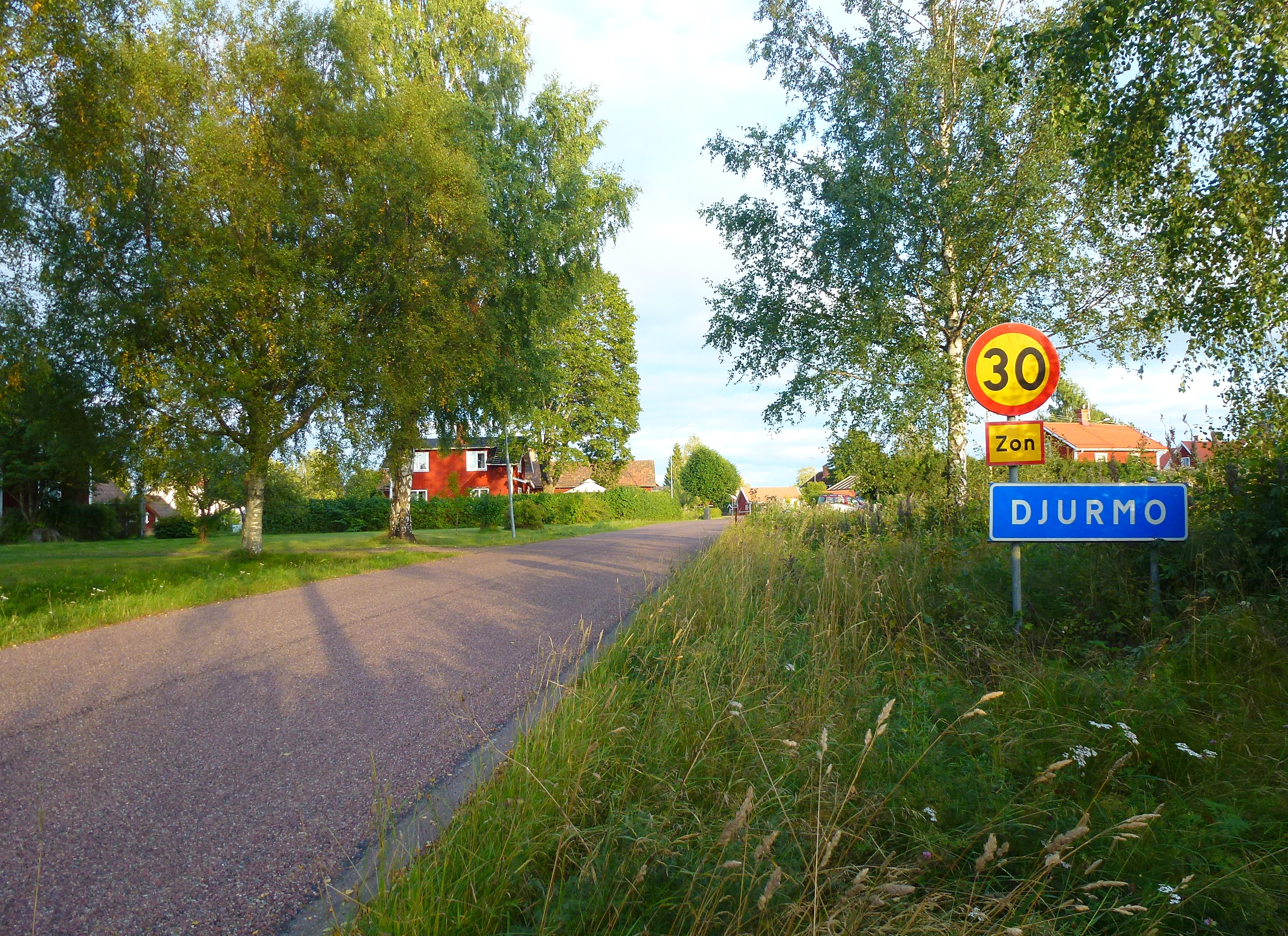 Djurmo, ortsinfart